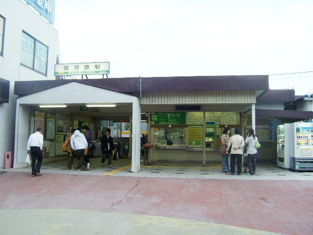 Shukugawara Station, Nambu Line, Tama-ku, Kawasaki, Japan